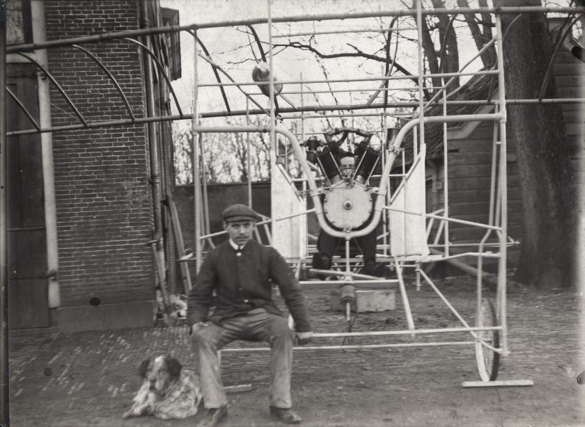 Nationaal Archief / Spaarnestad Photo, SFA022811618. Het eerste Nederlandse vliegtuig, ontworpen en gebouwd op 1 januari 1910 door de gebroeders Hamers & P. de Roos (op vliegtuig) te Oud-Rozenburg. De stof voor de "zweefvlakken" moet nog uit Frankrijk komen. 1910. Nederland The first Dutch airplane, designed and built by the Hamers brothers and P. de Roos. Picture: P. de Roos waiting for the delivery of the cover of the wings (ordered in France). Oud-Rozenburg, the Netherlands, january 1910. Collectie Spaarnestad Voor meer informatie en voor meer foto’s uit de collectie van Spaarnestad Photo, bezoek onze Beeldbank: U kunt ons helpen onze kennis van de fotocollecties te verrijken door tags en commentaren toe te voegen. Herkent u mensen of locaties of heeft u een bijzonder verhaal te vertellen bij één van de foto’s, laat dan een reactie achter (als u ingelogd bent bij Flickr) of stuur een mailtje naar: You can help us gain more knowledge on the content of our collection by simply adding a comment with information. If you do not wish to log in, you can write an e-mail to